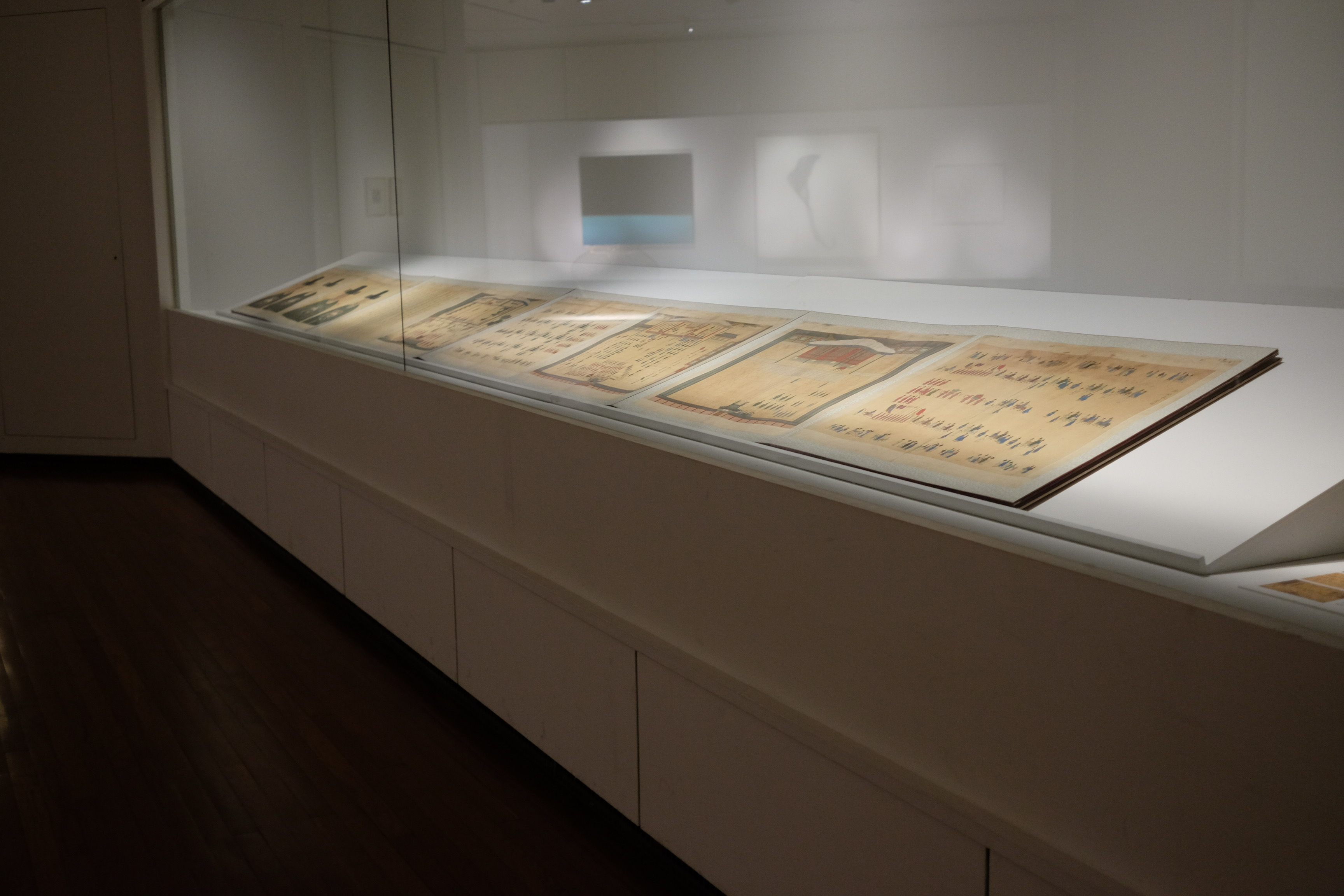 기사계첩, 조선, 18세기, 비단에 채색